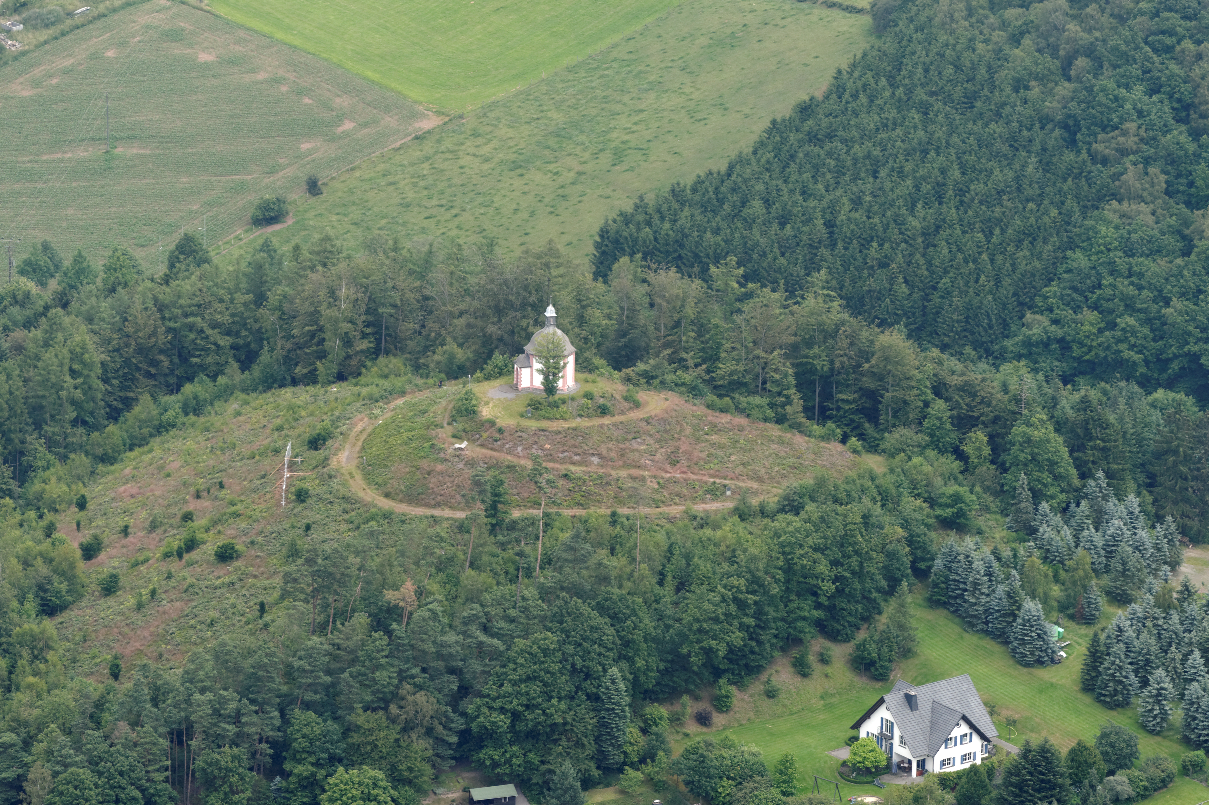 Fotoflug Sauerland Nord. Sundern (Sauerland)-Stockum, Rehberg-Kapelle. The making of this document was supported by the Community-Budget of Wikimedia Germany.